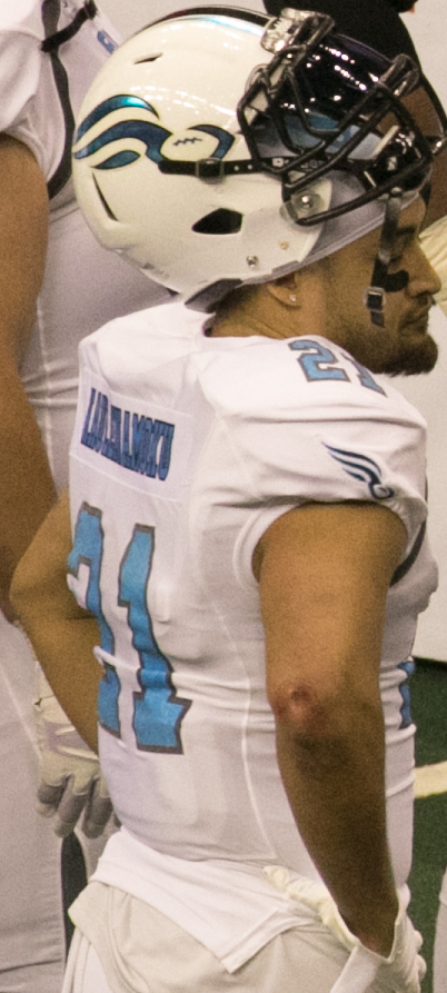 Valor 47 / Philadelphia Soul 48